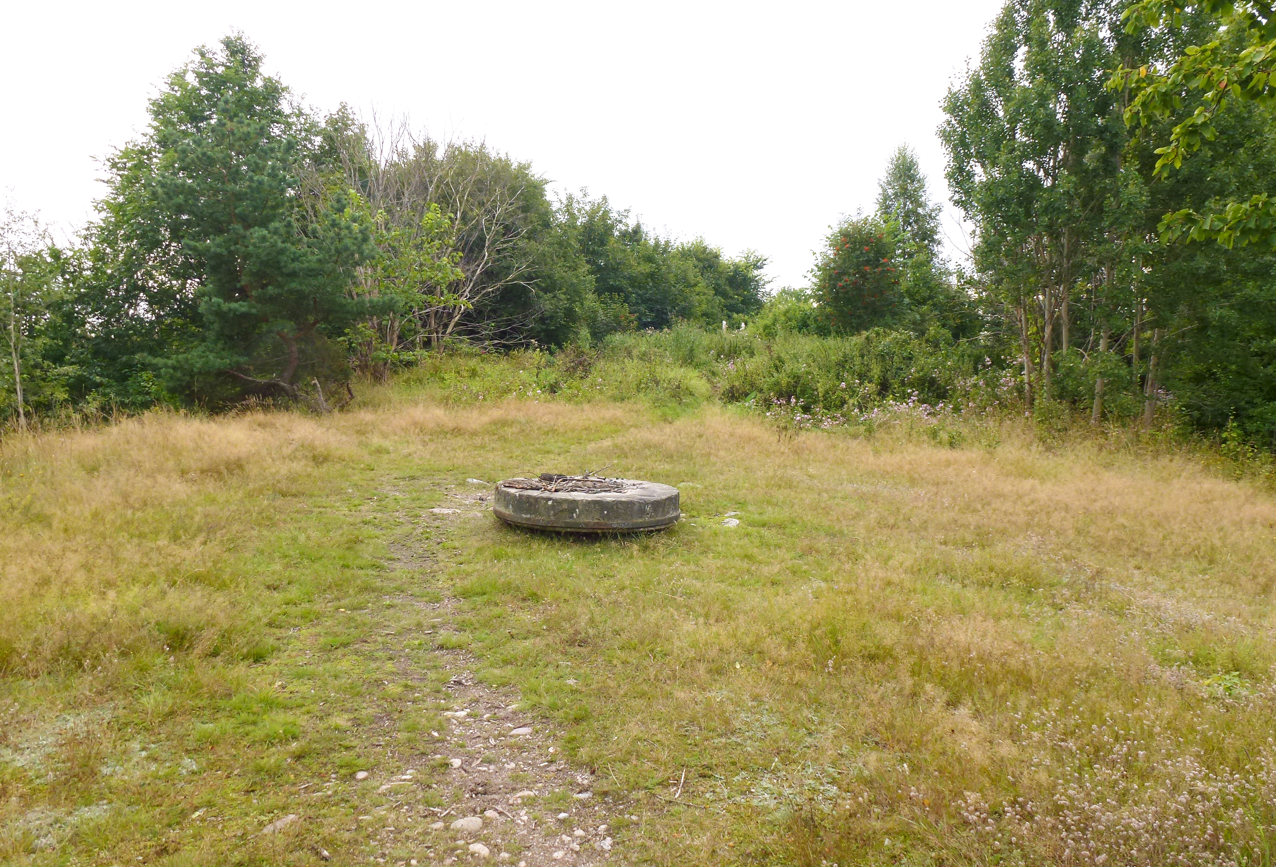 Ulriksdals kvarnkulle